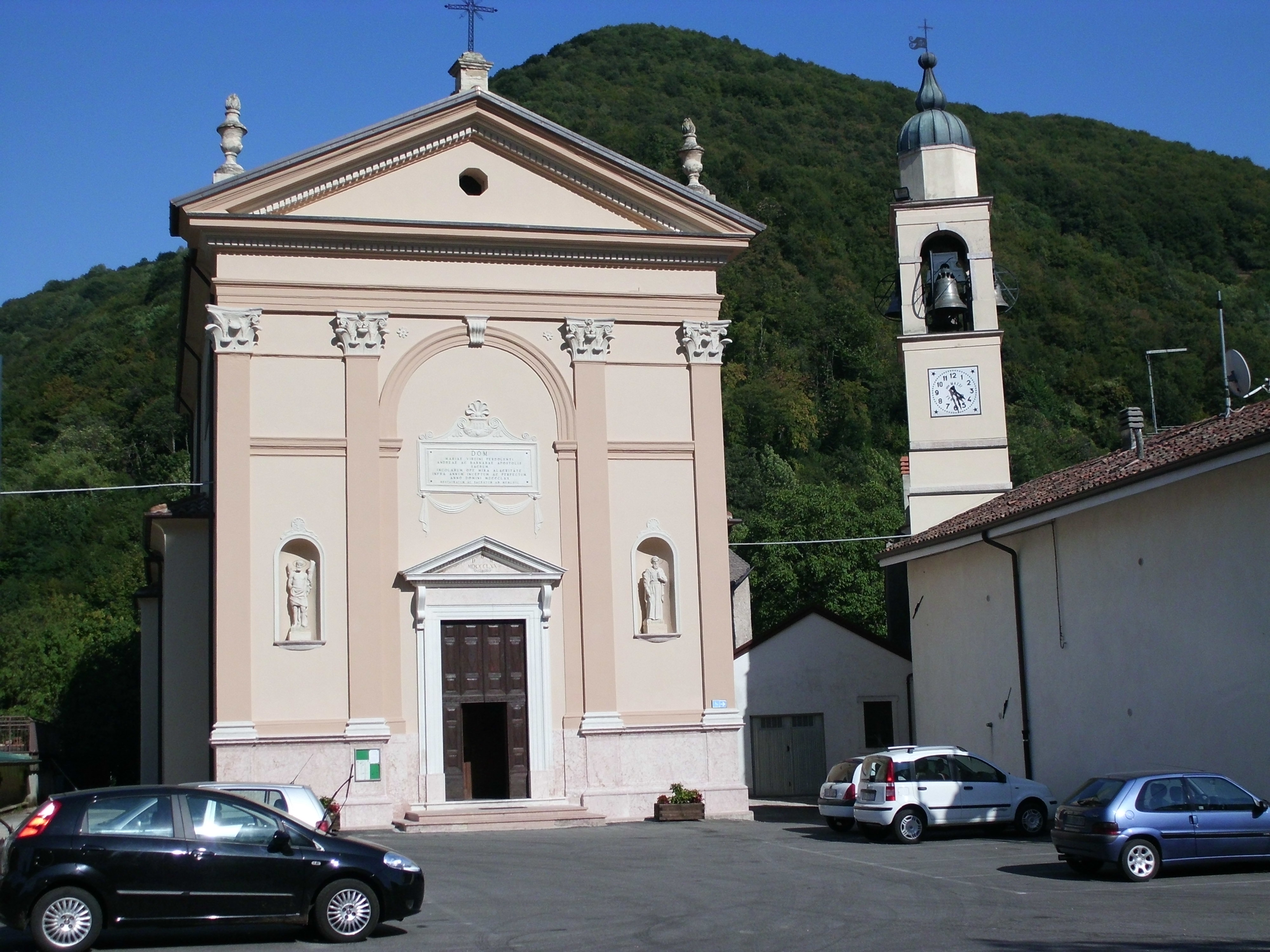 Chiesa parrocchiale di S. Andrea Apostolo in S. Andrea di Badia Calavena (VR).